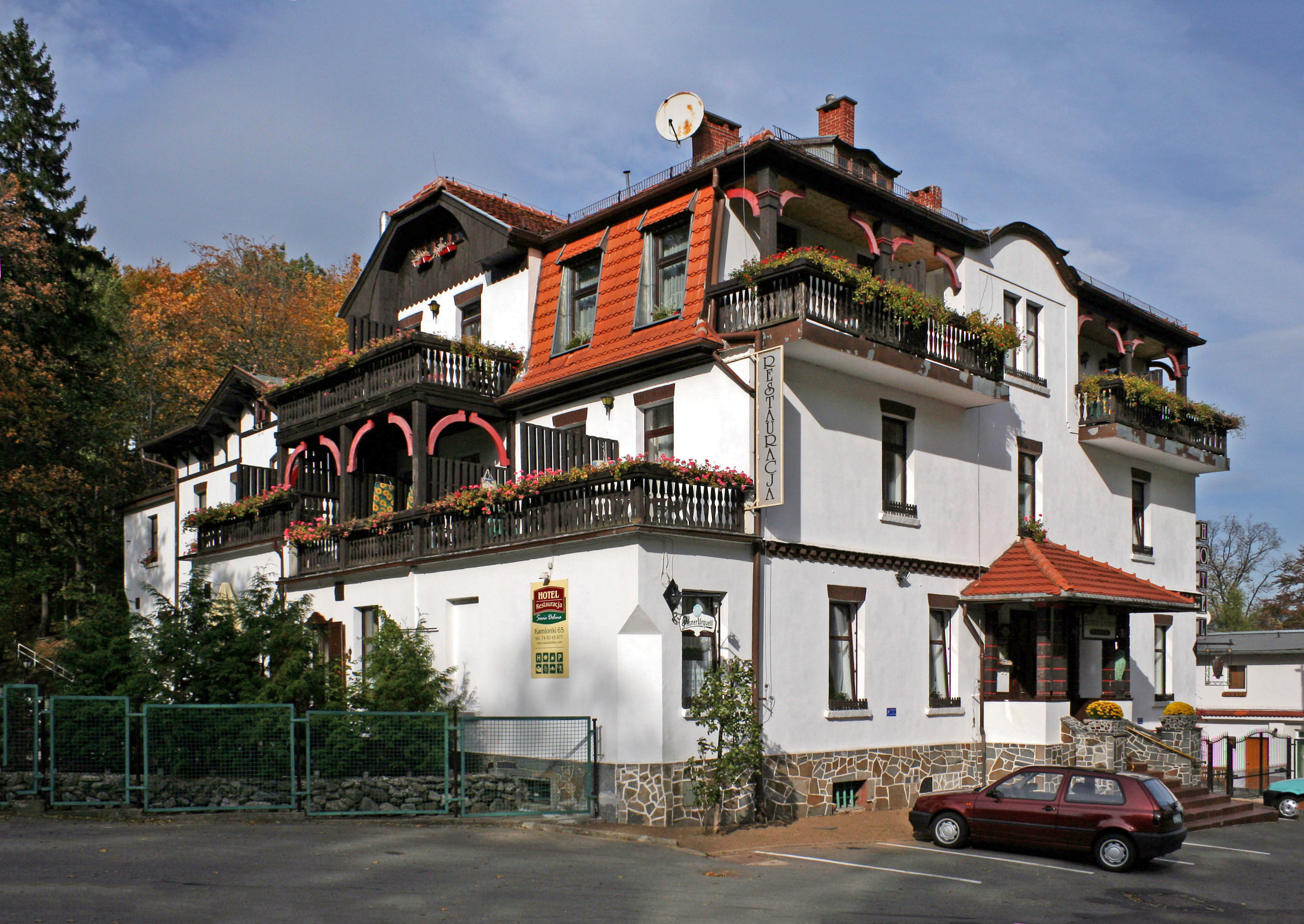 Hotel Sowia Dolina w Pieszycach Kamionkach